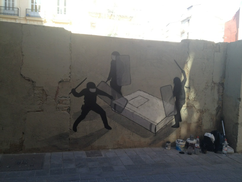 Grafit